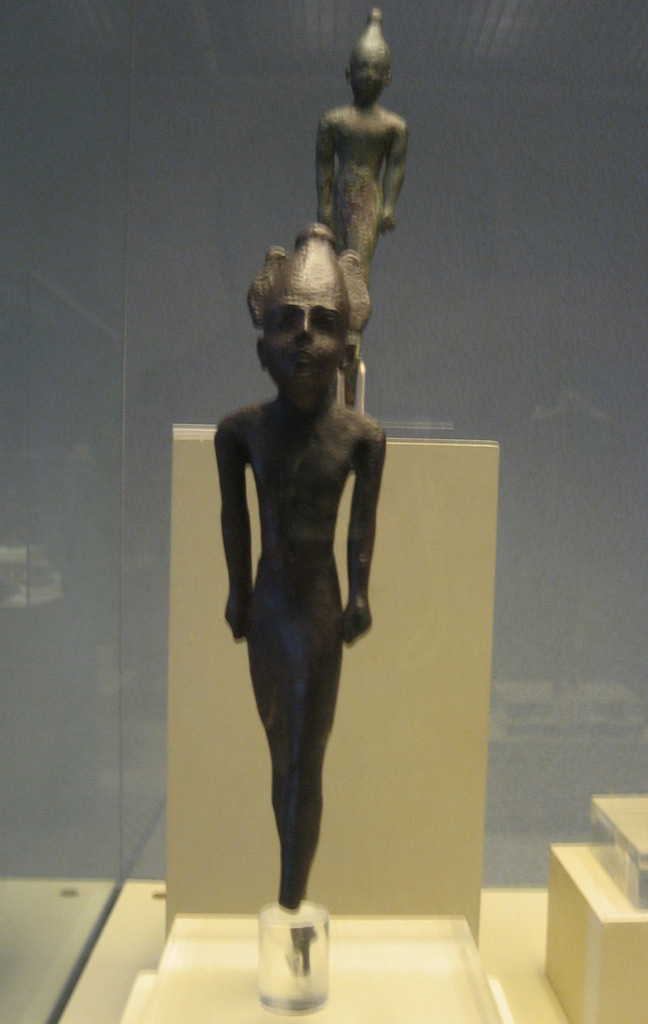 Estatuilla votiva del templo de Melkart-Hércules Gaditano, en el Islote de Sancti Petri (Provincia de Cádiz, Andalucía, España)